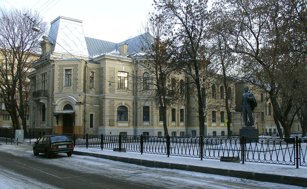 Ogorodnaya Sloboda Lane, Moscow.